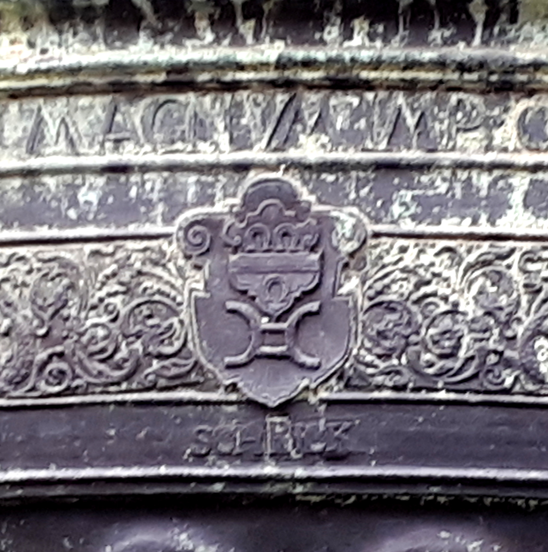 Wappen des Bürgermeisters Albrecht Schrick der Jüngeren an der Schale des Karlsbrunnens